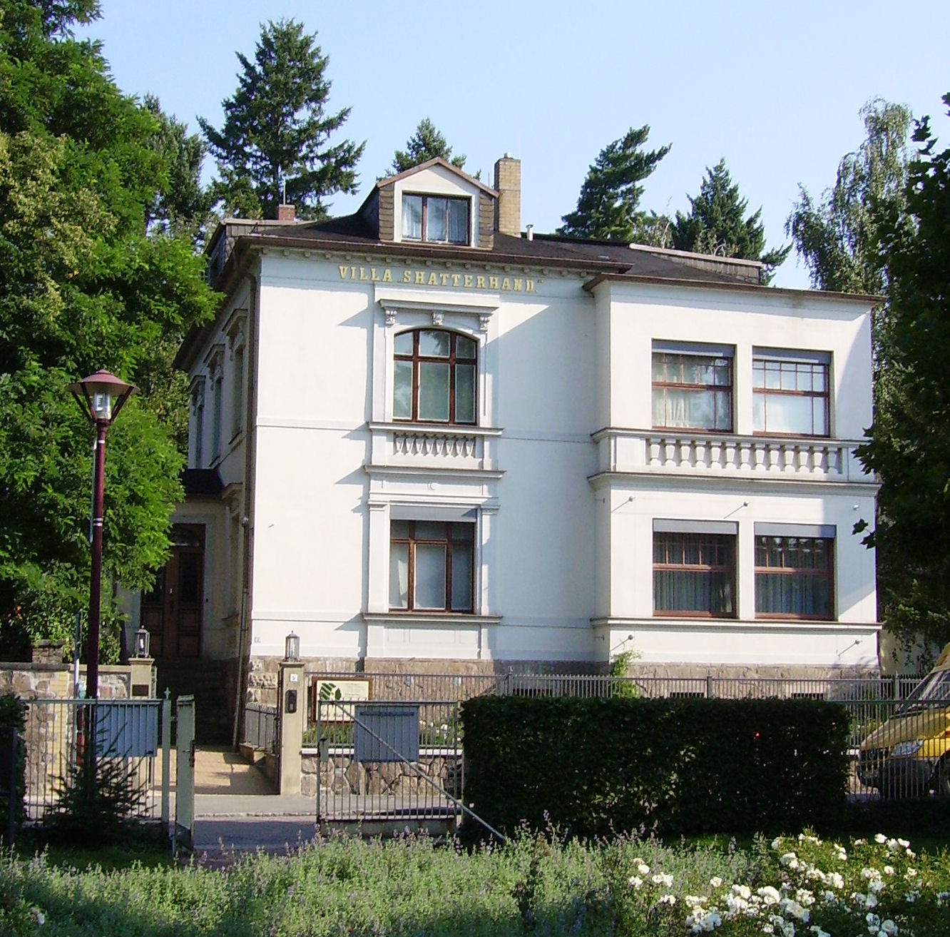 Karl-May-Museum in Radebeul (Germany)